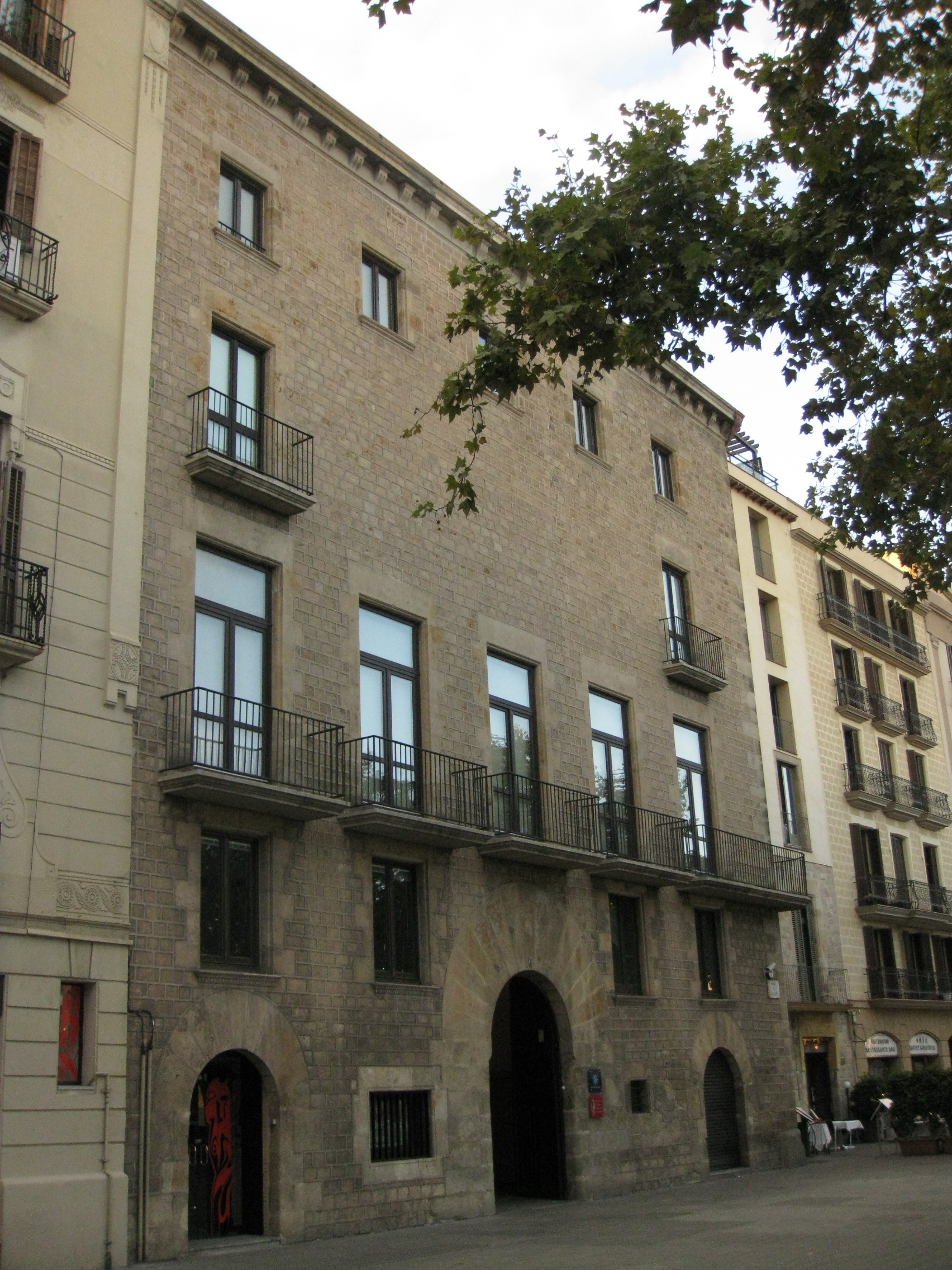 Palau Bru, gran casal amb façana al passeig de Colom i als carrers de Marquet i de la Mercè, al barri Gòtic de Barcelona. Construït a la darreria del segle XV, fou reformat el 1994 per acollir la seu de la SGAE a Barcelona. A la imatge, la façana principal del passeig de Colom.